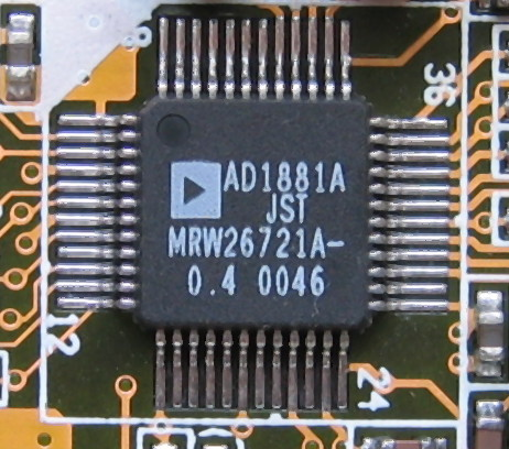 Audio Codec DA Converter AD1881A